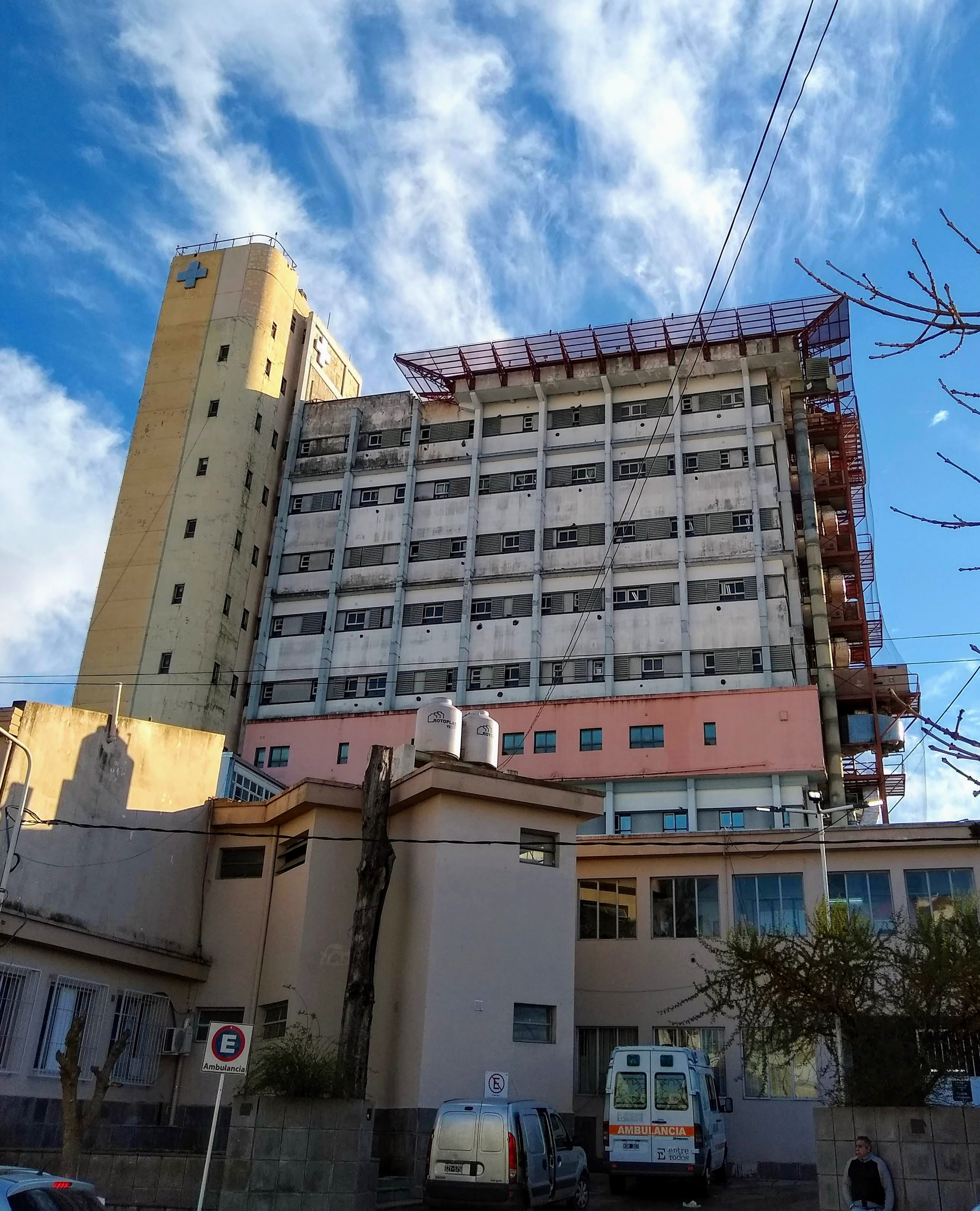 Fachada de la torre alta del Hospital San Roque de Paraná.